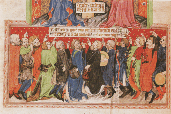 Konšelská přísaha z právního kodexu města Jihlavy